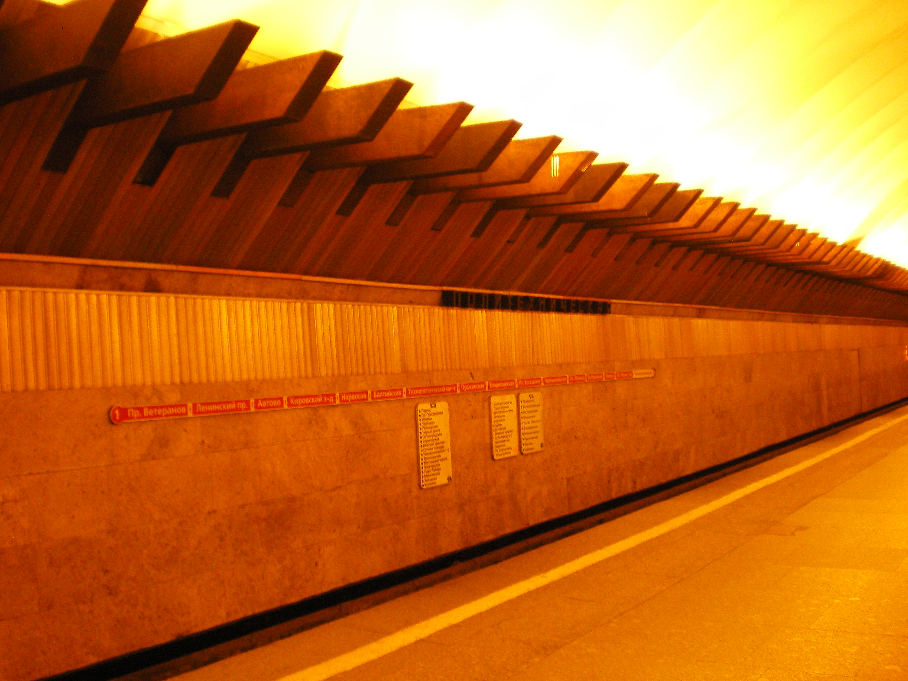 Станция метро «Политехническая». Путевая стена.